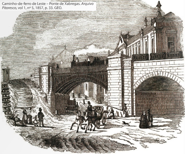 Ponte de Xabregas em 1857 - Passagem de comboio